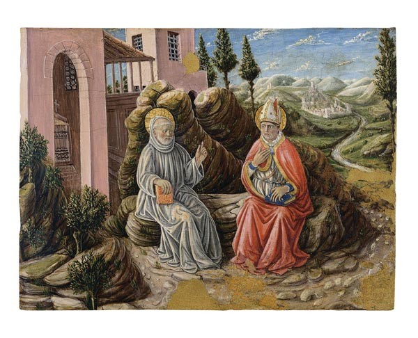 Pintura al óleo sobre tabla titulada San Sabí conversant amb sant Benet del autor Giovani Boccati. Se conserva en el Museo Nacional de Arte de Cataluña. Barcelona (Spain)